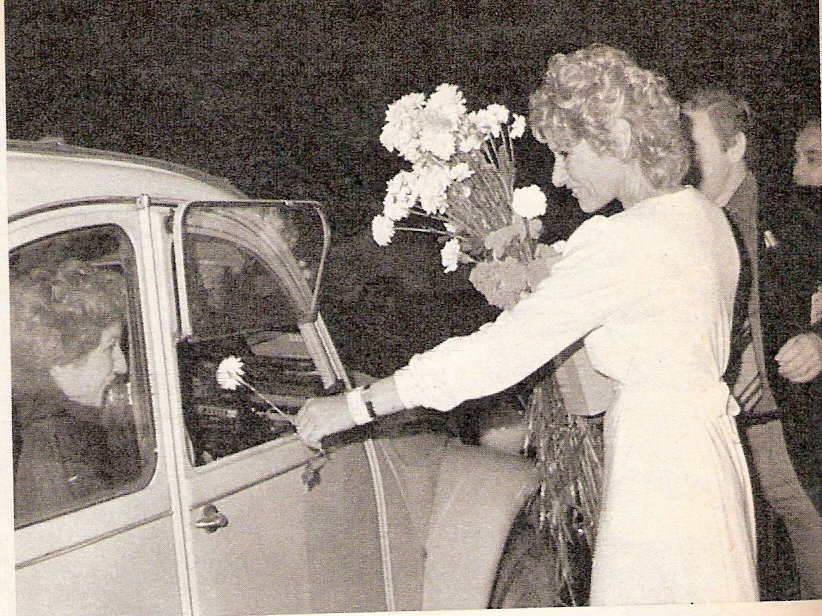 actriz argentina haydee padilla entregando flores a cambio de contribuciones, en "24 horas por Malvinas"